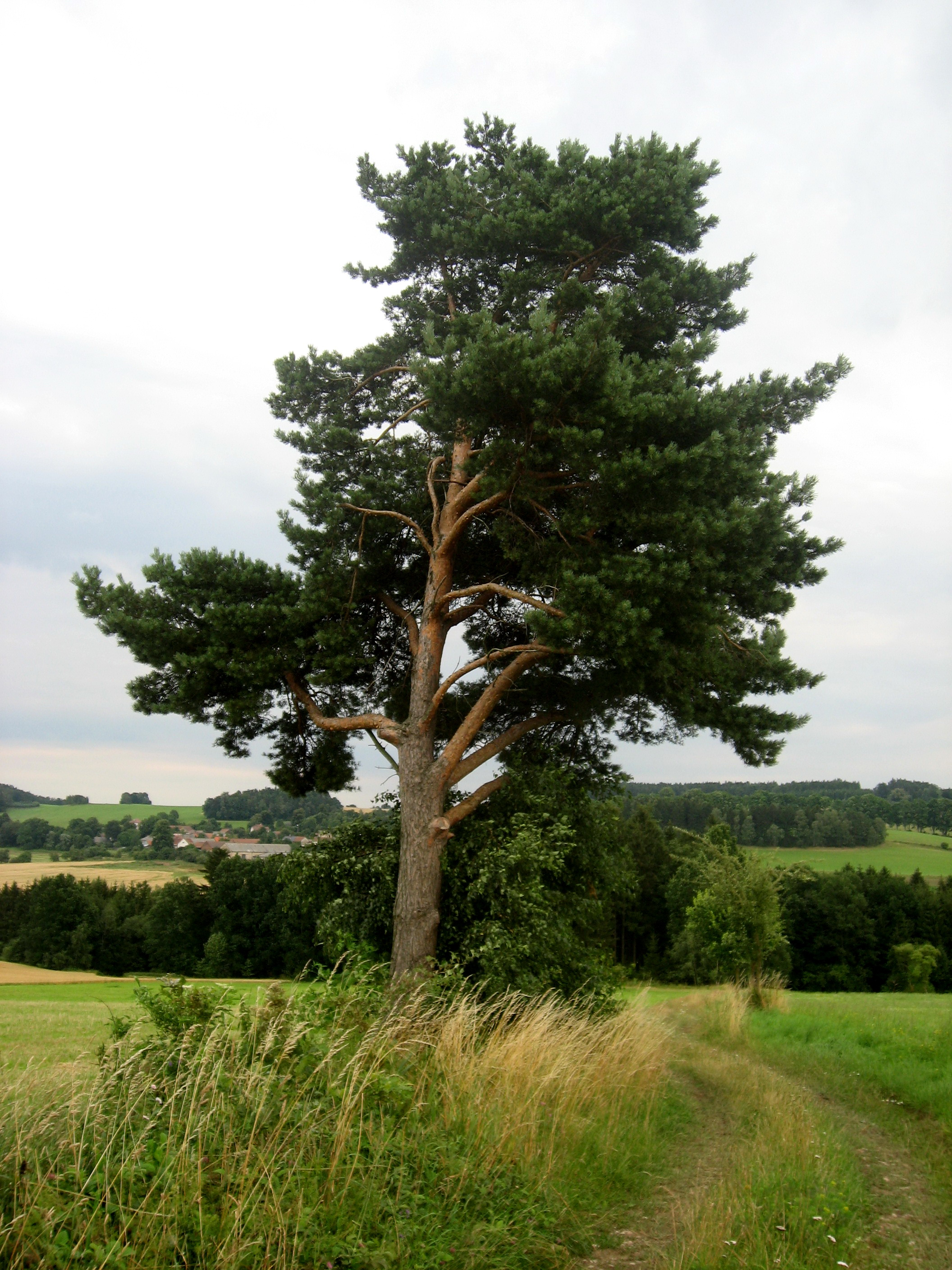 Borovice na cestě mezi Boňkovem a Koječínem